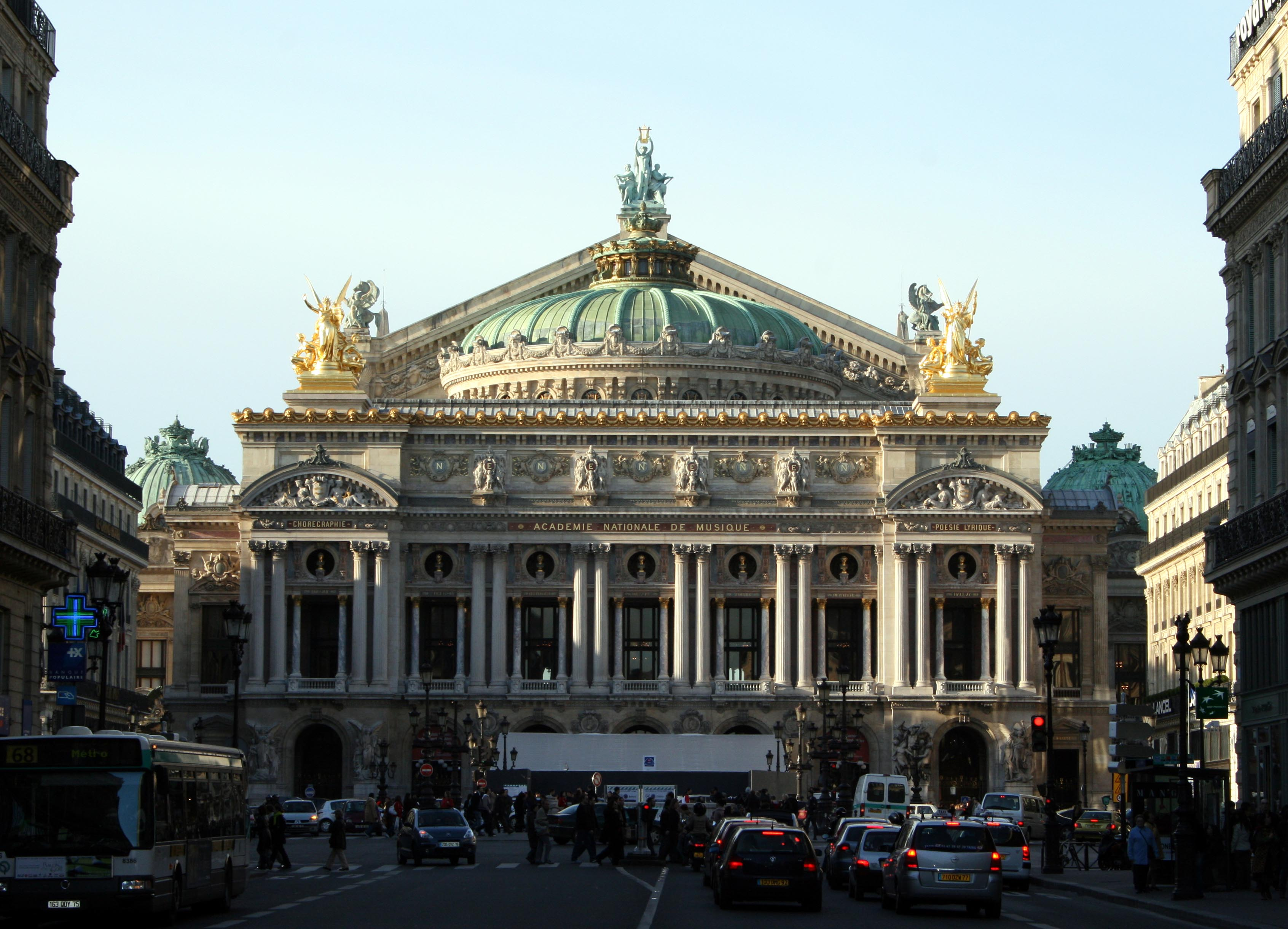 Opéra Garnier